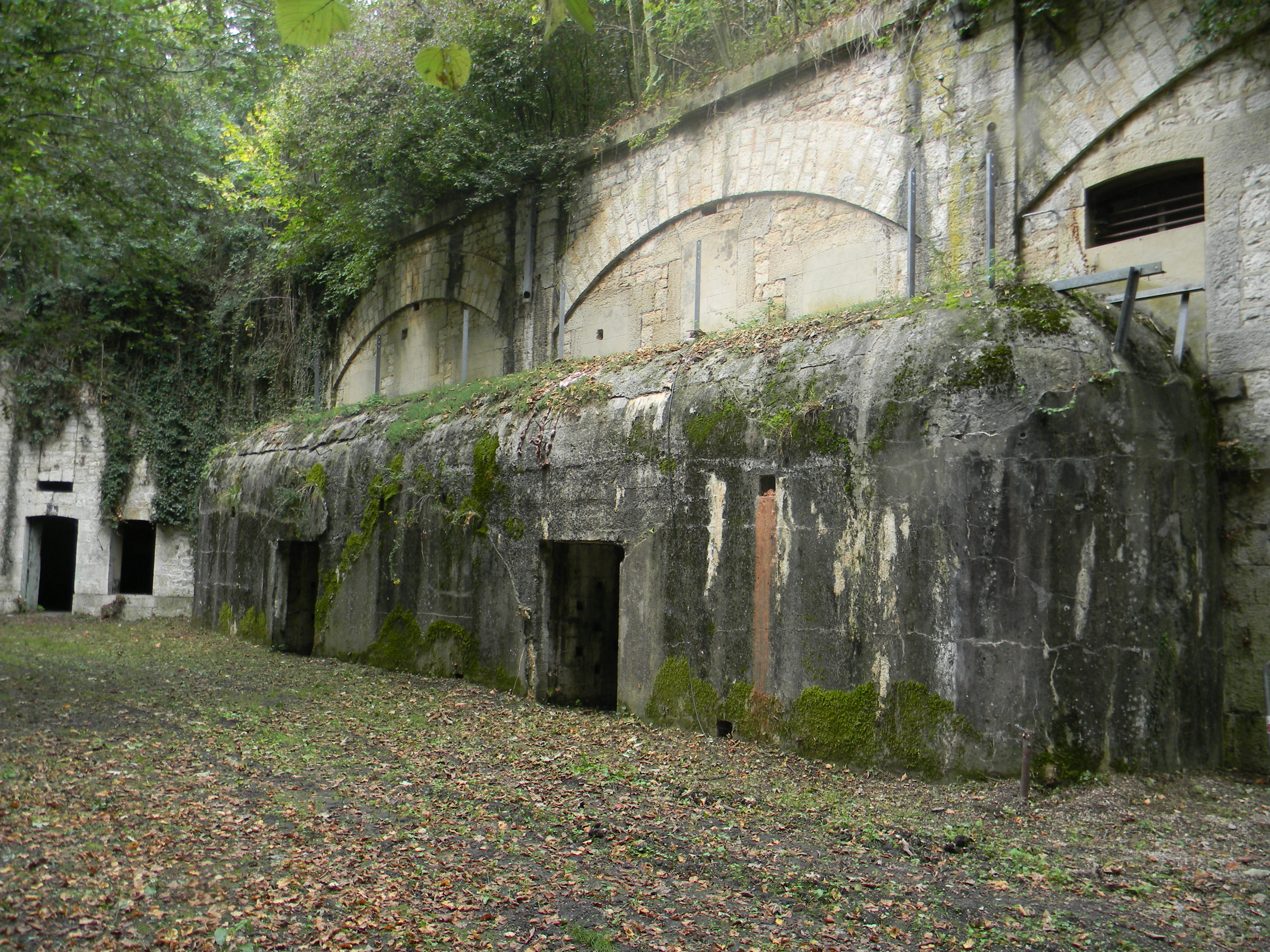 Renforcement en béton pour la caserne du cavalier du Fort de Vancia.